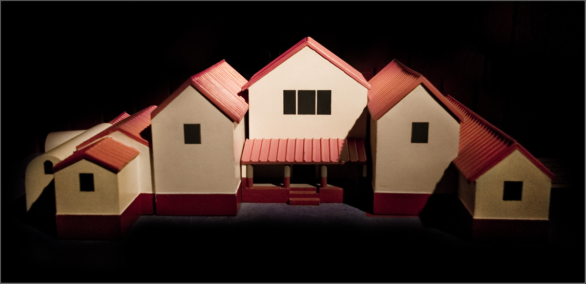 Lullingstone, Roman Villa, Model